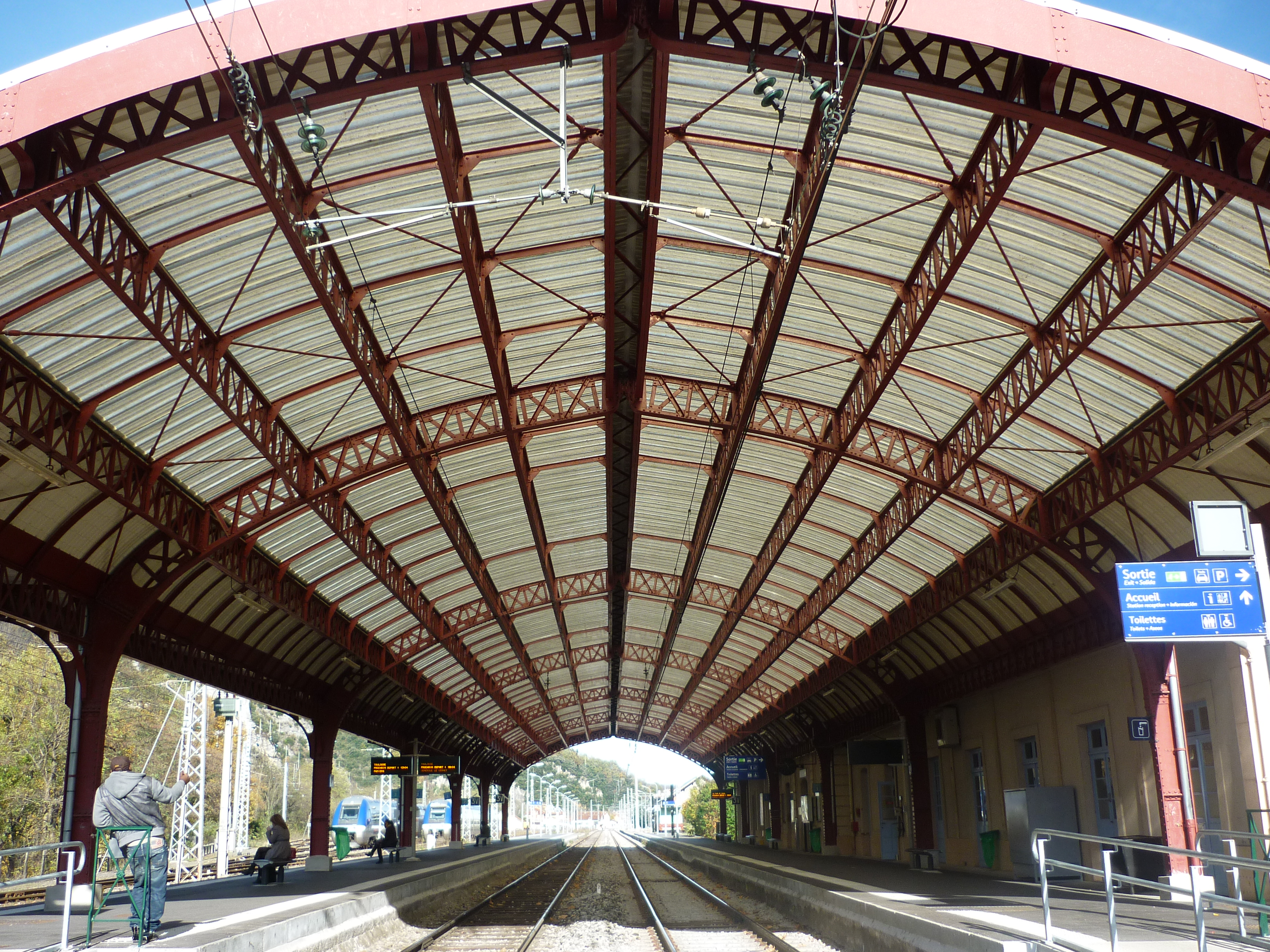 la gare de Foix (Ariège, Pyrénées) vue intérieure, des quais et de la marquise ou verrière